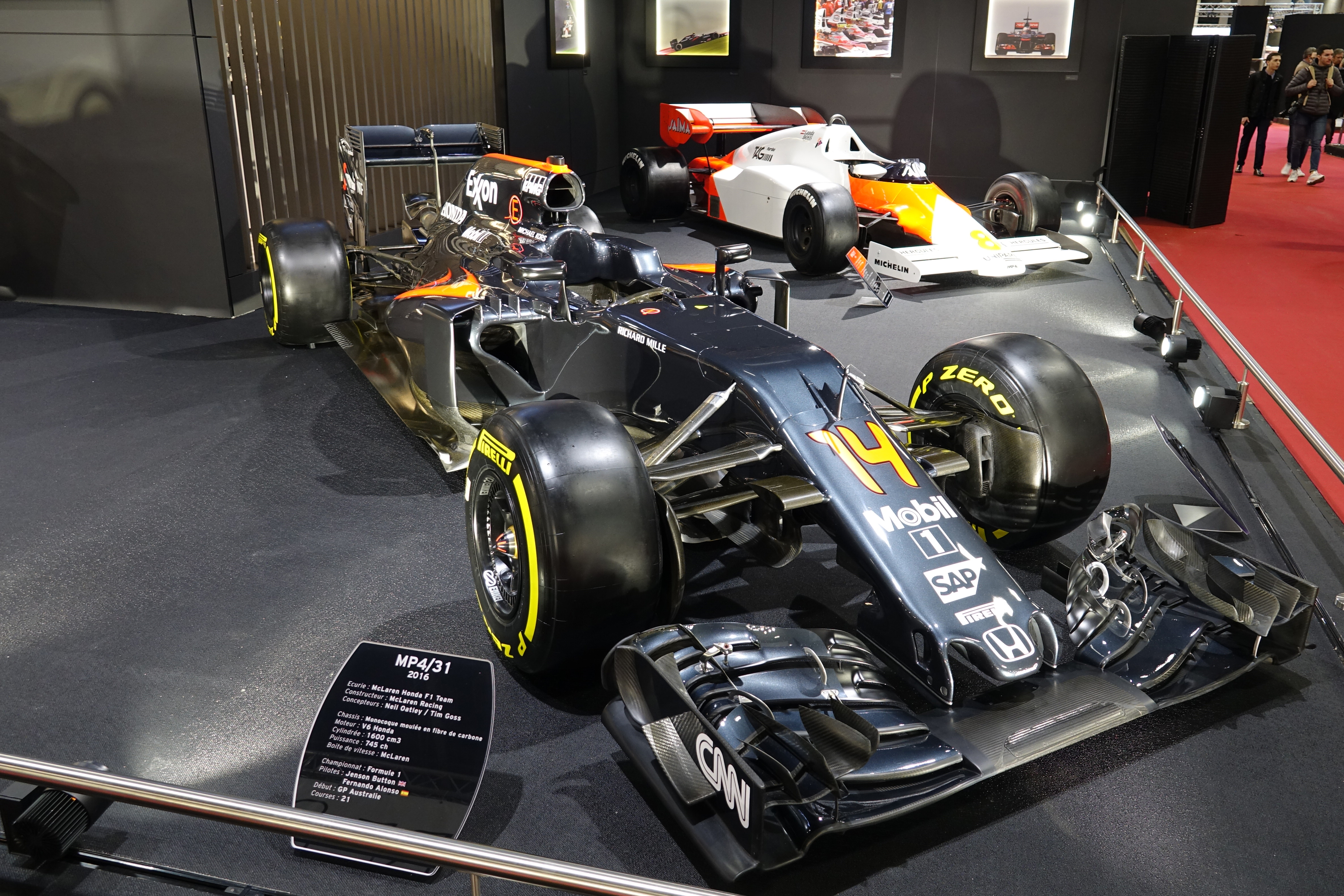 Exposition Richard Mille McLaren à Rétromobile 2019